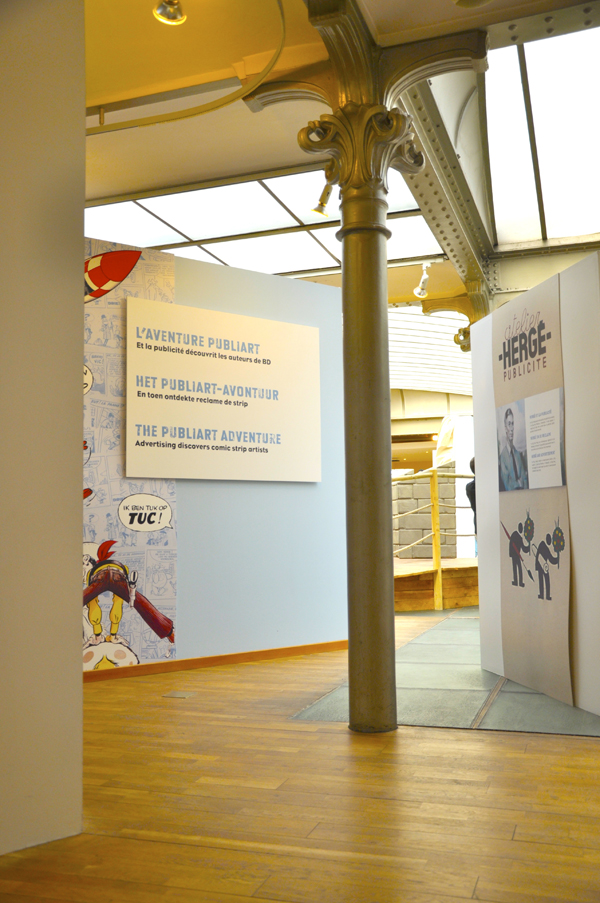 Espace Publiart du Centre belge de la bande dessinée